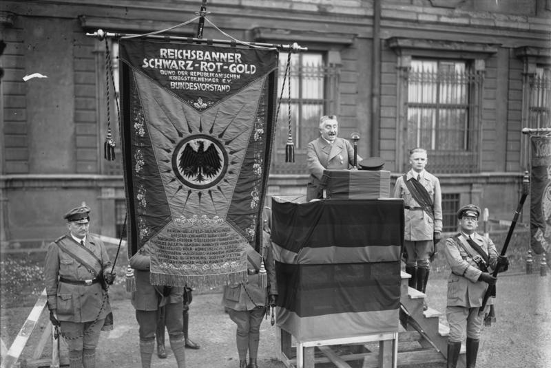 Die grosse Verfassungsfeier am 11. August in Berlin! Der Bundesvorstand des Reichsbanners Hörsing spricht vor dem Schloss in Berlin.